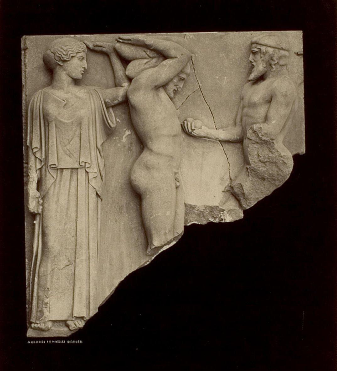 Metope von der Ostseite des Zeus-Tempels in Olympia: inmitten Herakles, das Himmelsgewölbe tragend, - doch ist auf seinem Haupte nur ein Kissen dargestelt -, hinter ihm eine Jungfrau, welche ihm hilft, vor ihm Atlas, welcher ihm die Aepfel der Hesperiden bringt. (Pausanias V, 10,9 mit einem bei der Höhe der Aufstellung erklärlichen Mißverständniß). Gefunden am 19. April 1876 im Pronaos des Tempels vor der an ihrer Stelle befindlichen nördlichen Säulentrommel des Pronaos, 0,50 M. unter dem heutigen Boden, 0,60 M. über dem Tempelpflaster, zum Theil unter einem Triglyphen, der wahrscheinlichen die Platte in drei Stücke gebrochen und die rechte Ecke in viele kleine Stücke zerschmettert hat. H. 1,60 M., Br. 1,50 N. Plattenstärke 0,12 M.